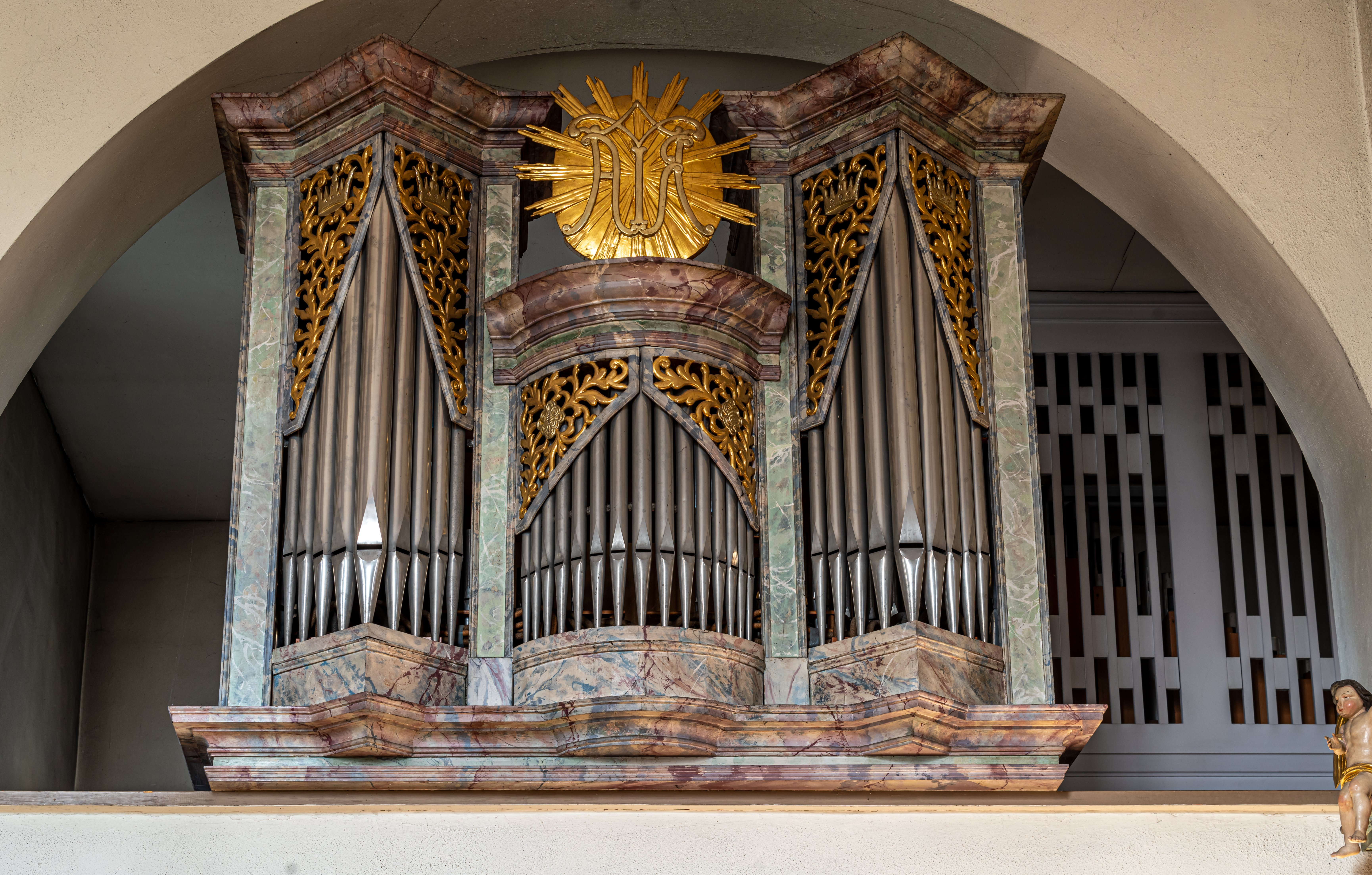 Bilder von St. Martin in Feldkirch